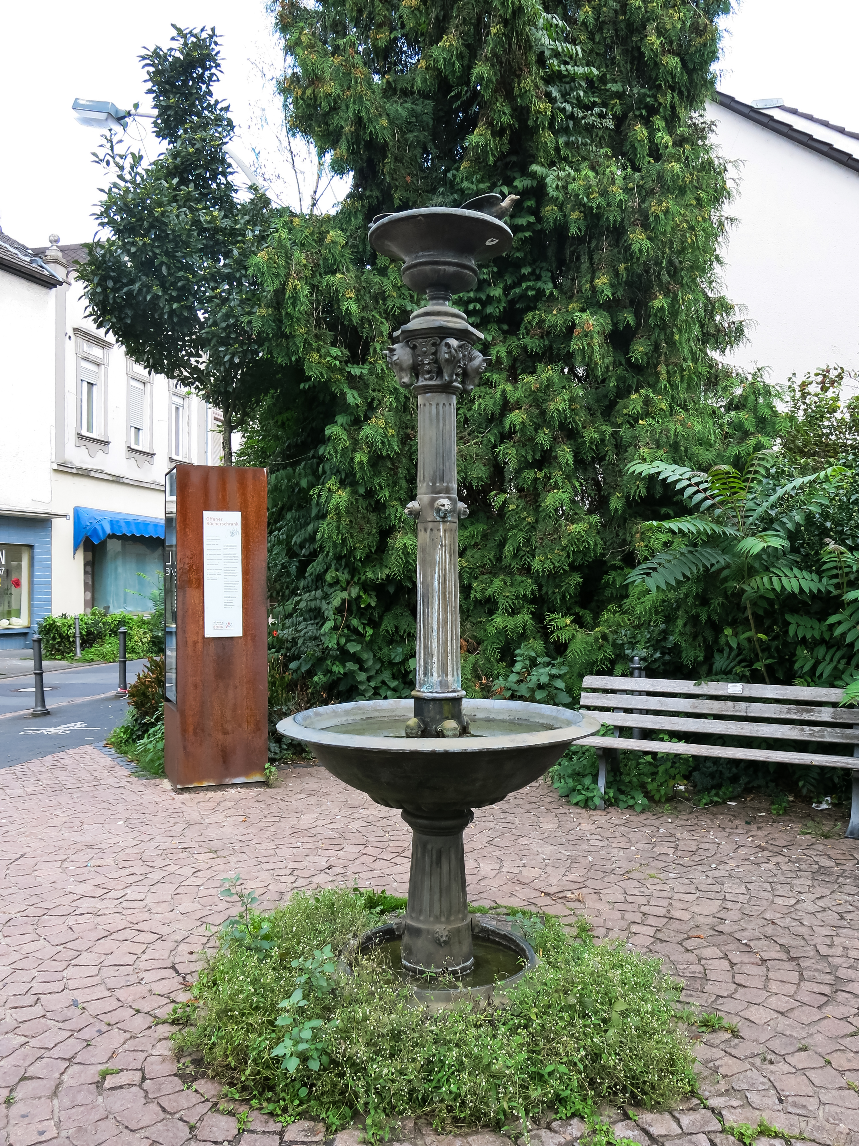 Bei der Endenicher Pferdetränke handelt es sich um eine Kopie der Tränke, die auf dem Bonner Remigiusplatz steht. Die Tränke ist aus Bronze und nicht wie sonst üblich aus Gusseisen. Der Aufbau entspricht der üblichen Aufteilung mit drei unterschiedlich großen Brunnenschalen, die als Tiertränken dienen. Die untere Schale für Hunde, die mittlere für Pferde und die oberste für Vögel. Die Funktionen sind über die Pferdeköpfe, die als Wasserspeier dienen, die Vögel und die Löwenköpfe dargestellt. Bis zum Zweiten Weltkrieg gab es an dieser Stelle einen Eisenbrunnen. Die von Sigrid Wenzel geschaffene Kopie wurde 1989 / 1990 aufgestellt und soll daran erinnern, dass hier die Endstation der Pferdebahn vom Bonner Markt nach Endenich lag.